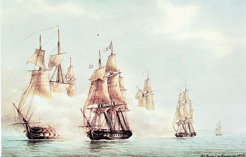 Prudente